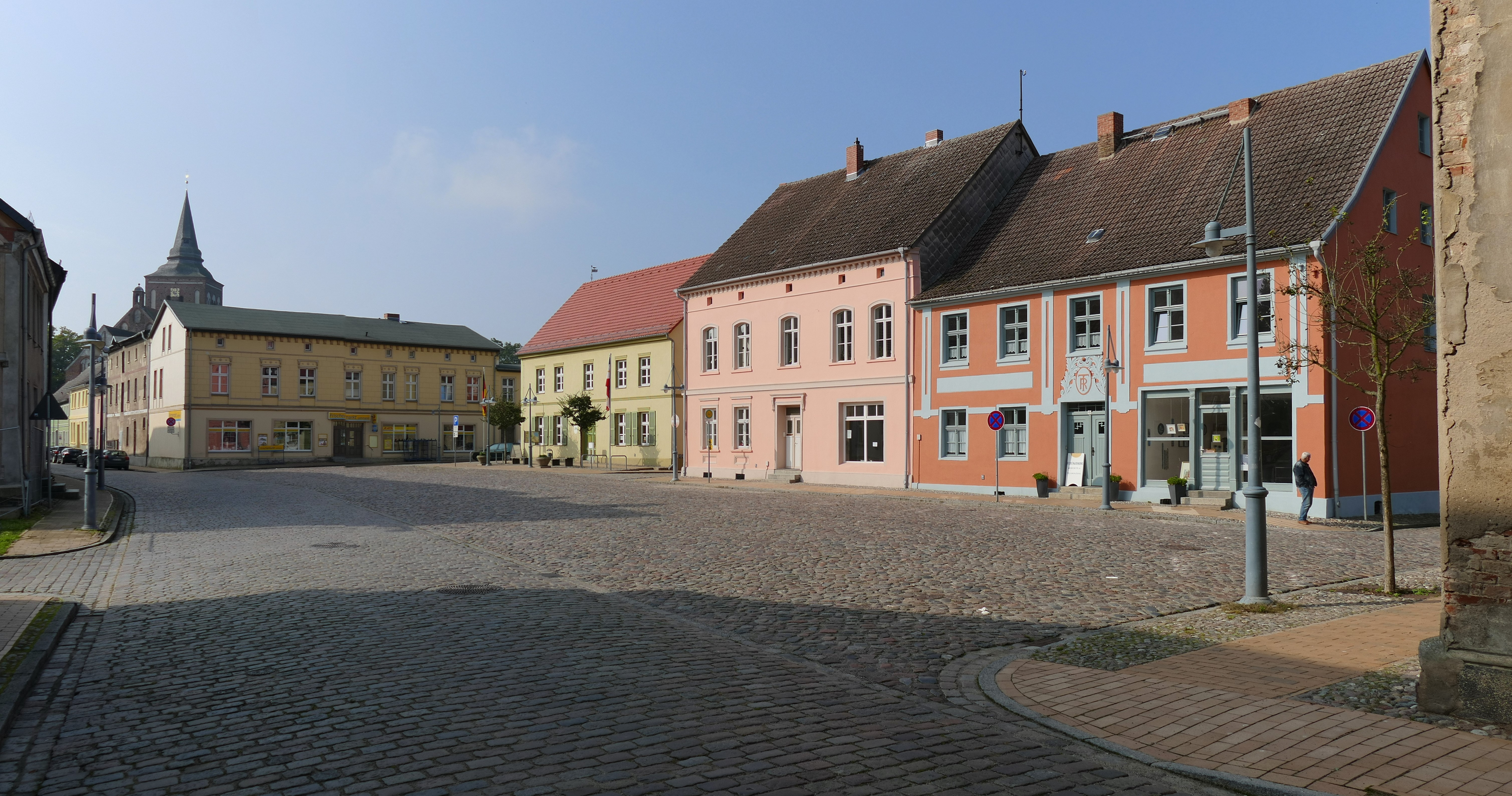 Lassan, Marktplatz von Nordosten